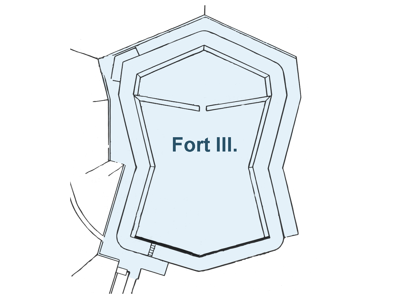 Befestigungsanlagen auf dem Klüt, Fort III.